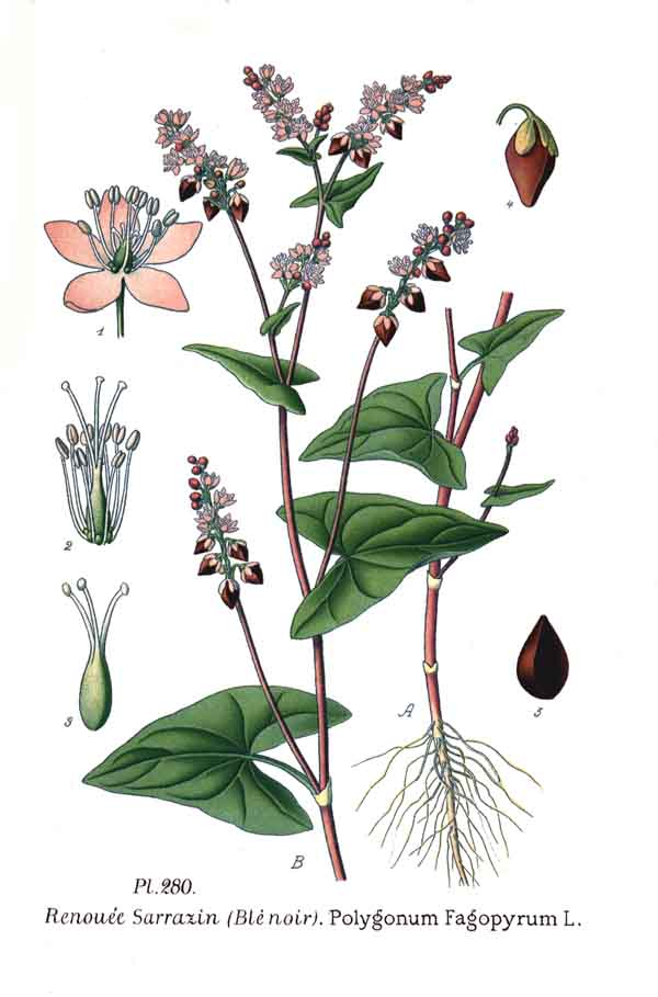 Fagopyrum esculentum (syn. Polygonum fagopyrum)